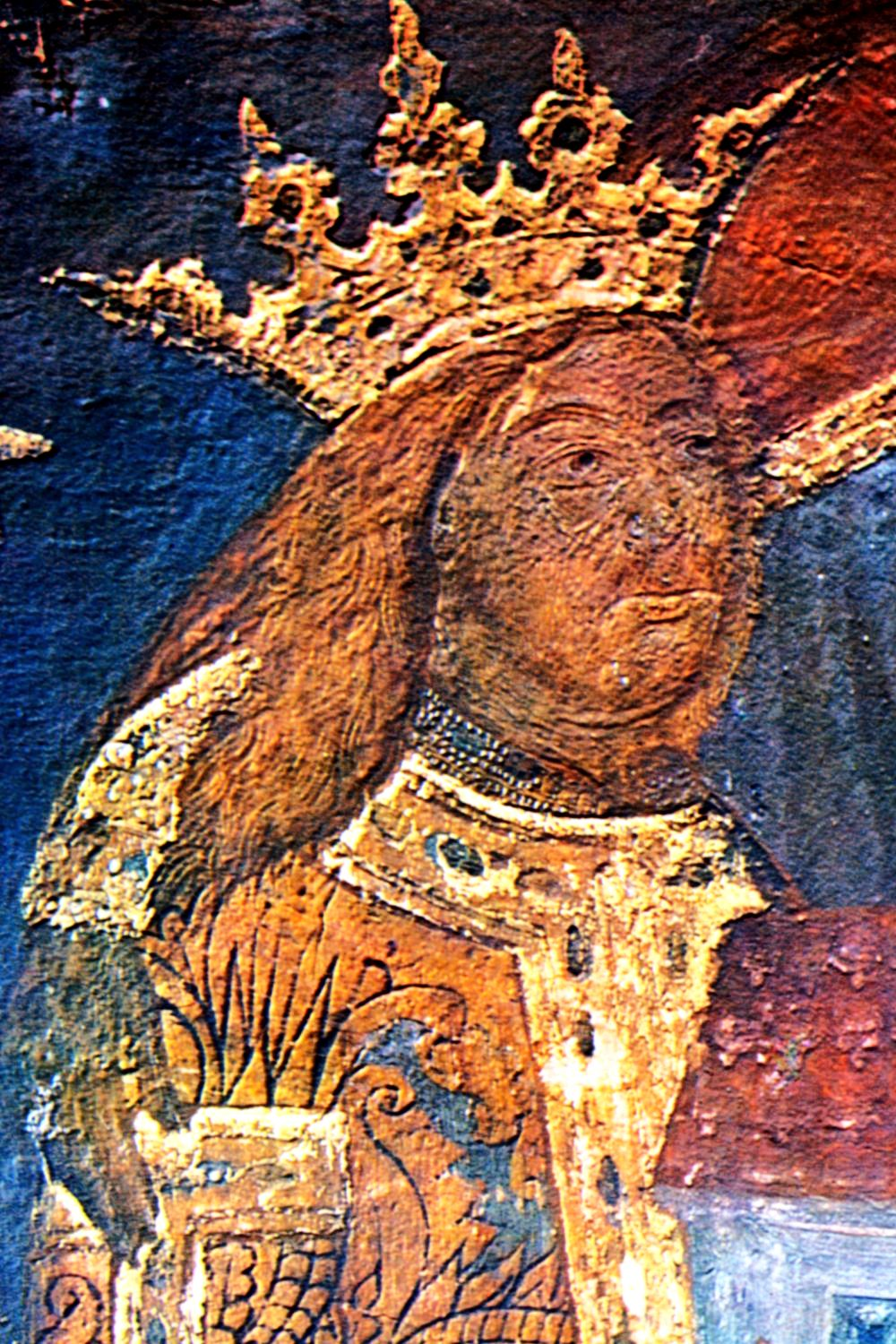 Ştefan cel Mare at Voroneţ monastery